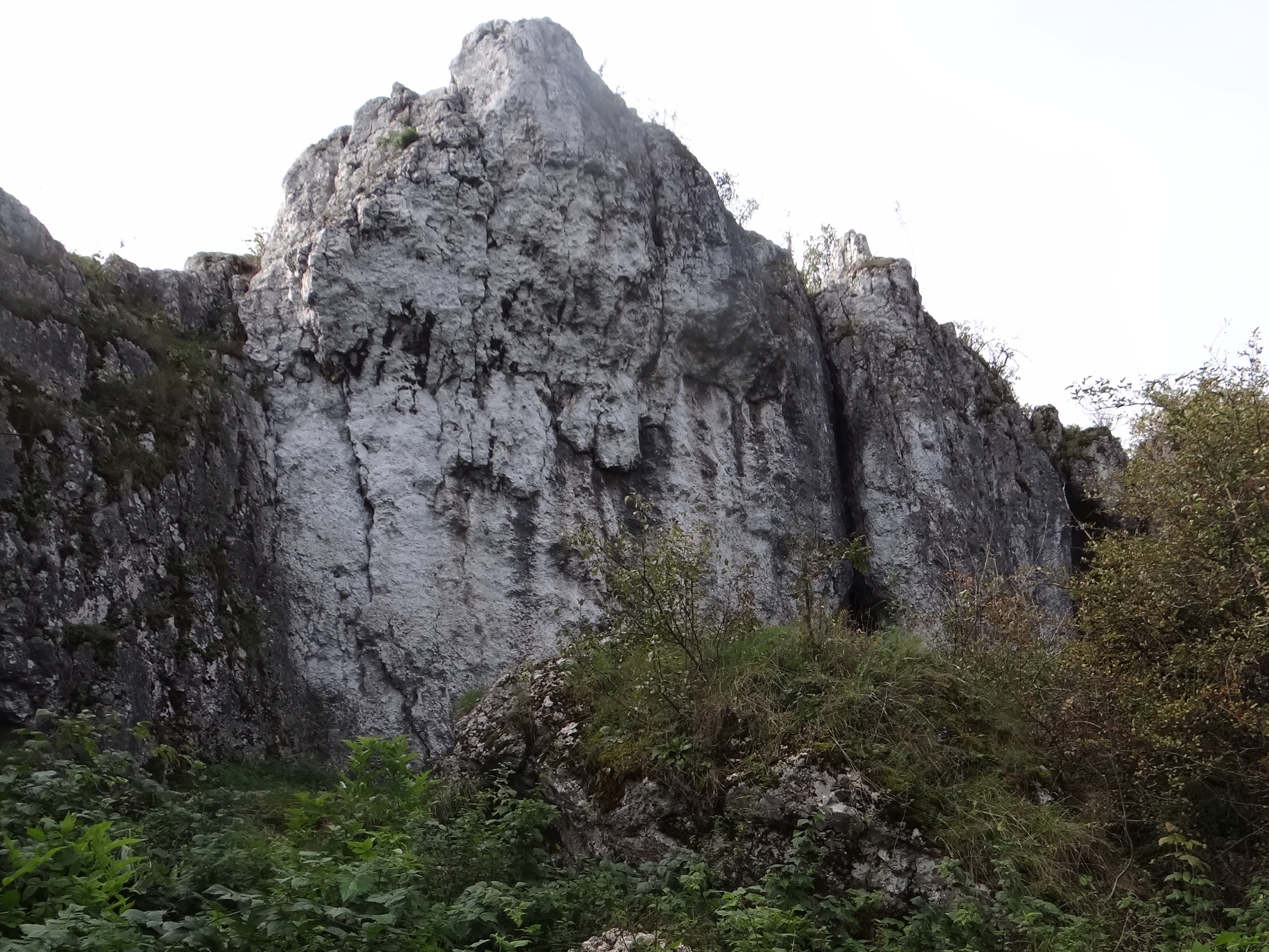 Żytnia Skała, ściana północna